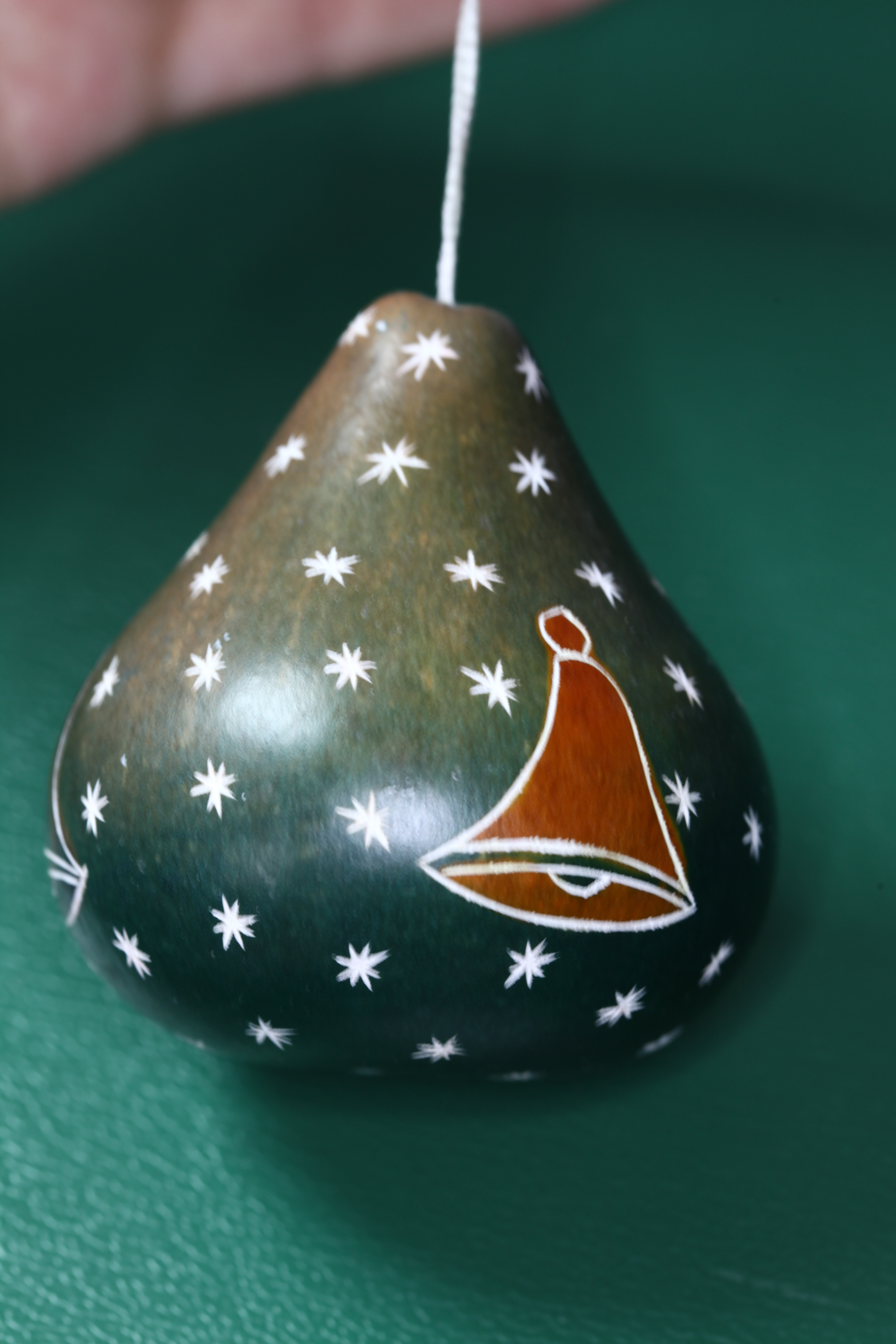 Mate burilado, de Peru